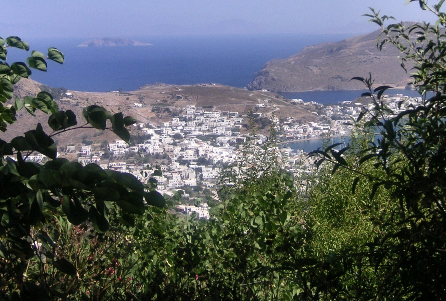 Skala, gesehen vom Kloster des Agios Ioannis Theologos.